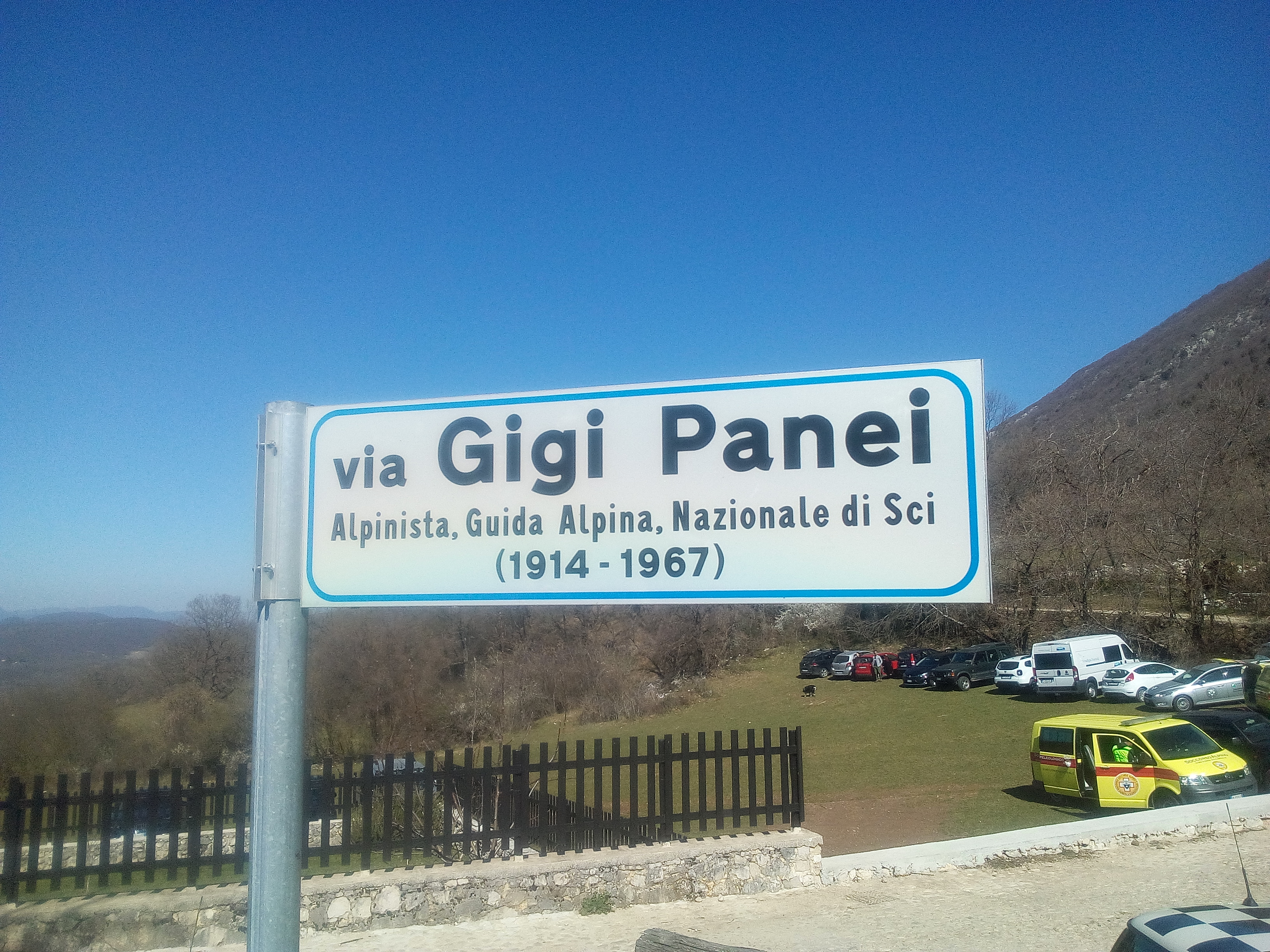 Targa toponomastica dedicata a Gigi Panei a Cartore di Borgorose